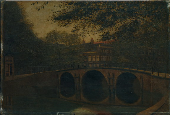 schilderij; stadsgezicht; stadsgezicht Amsterdam; Keizersgracht; Reguliersgracht